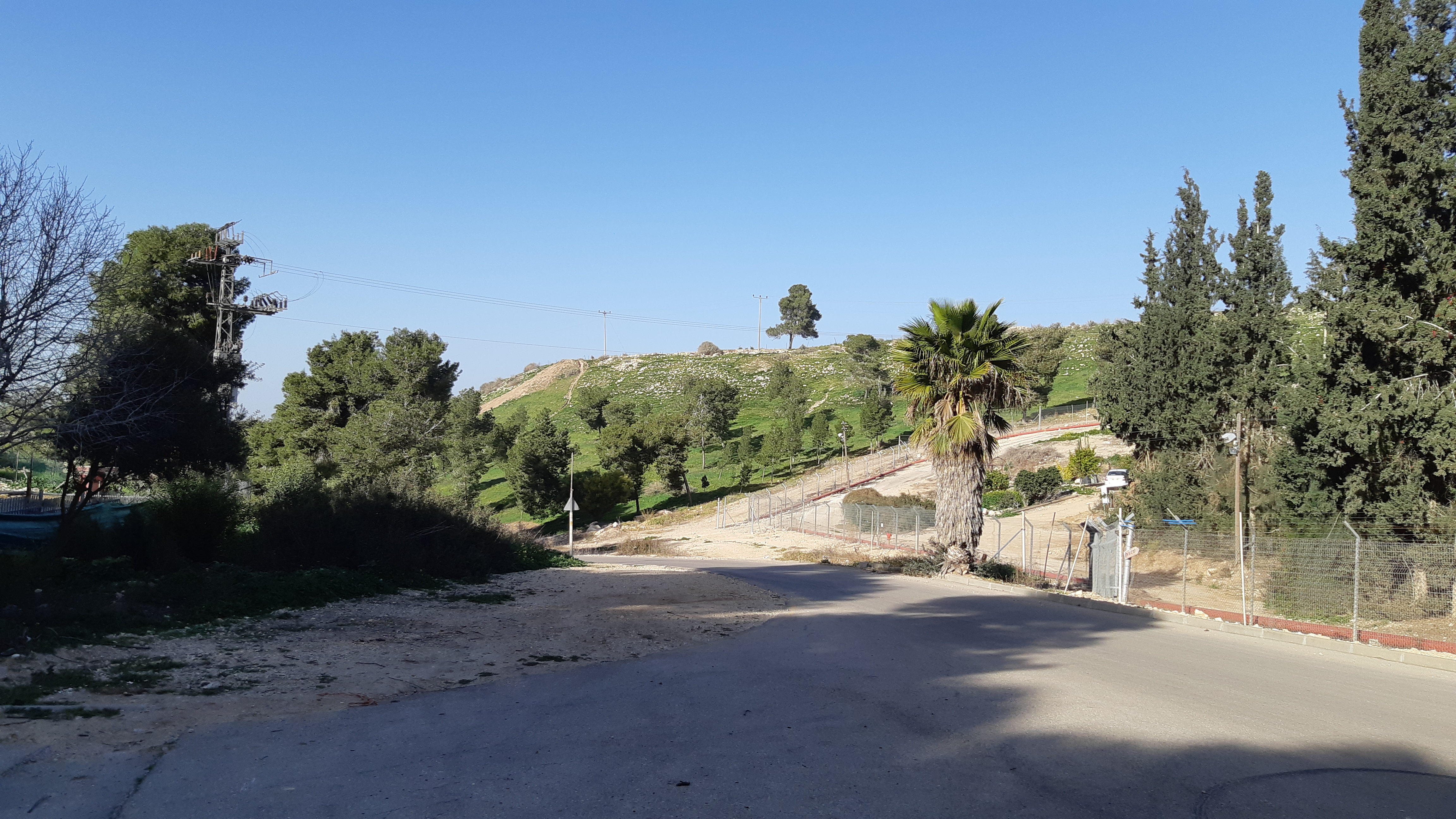 תל חליף - מבט מדרום